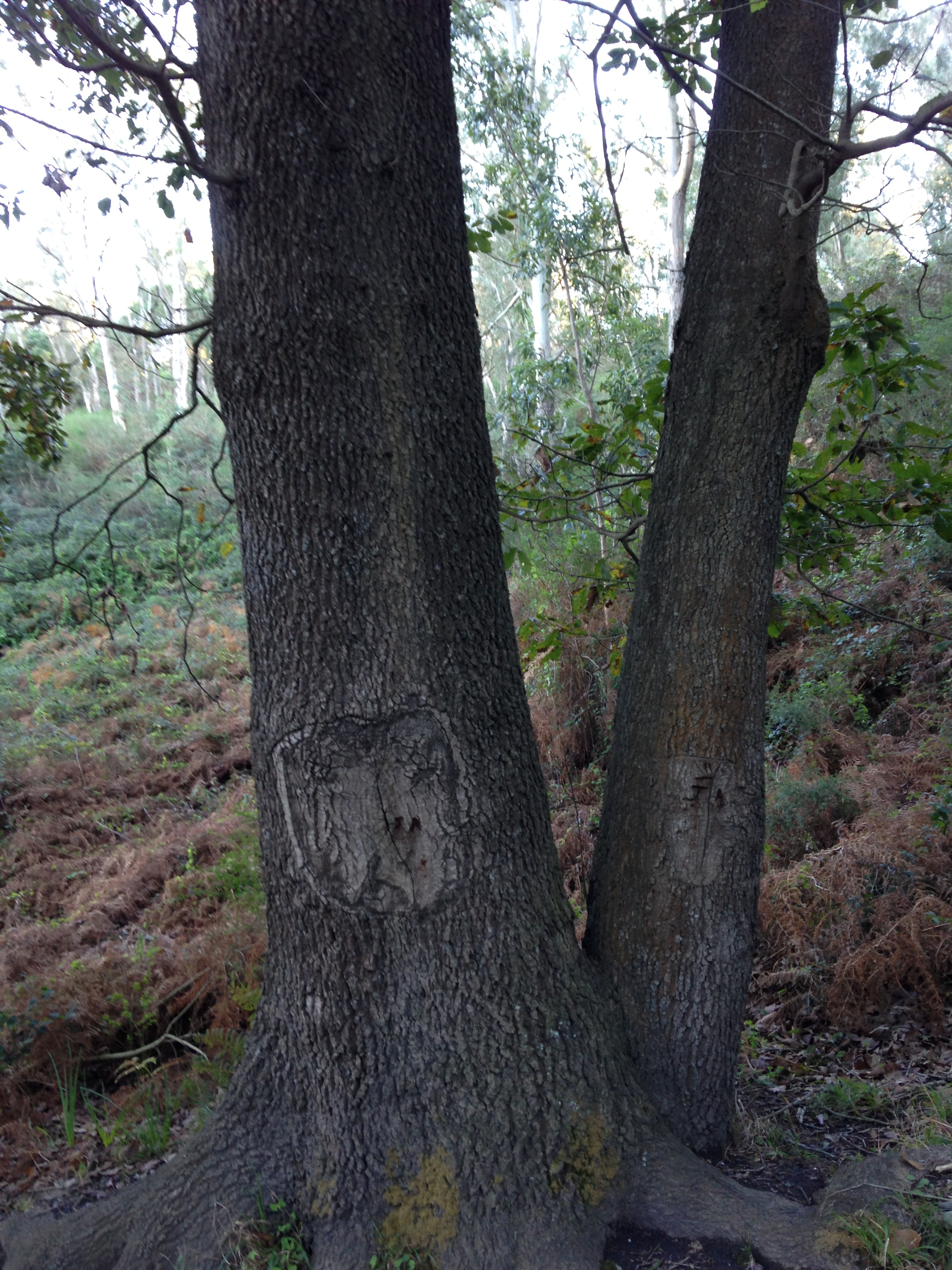 Quejigo Moruno o Roble andaluz (quercus canariensis) de la fuente de los perros) en Ceuta (Garcia Aldave), ejemplar singular autoctono detalle tronco This is a photography of a Special Area of Conservation in Spain with the ID: ES6310001. Natura2000 entry, EEA entry